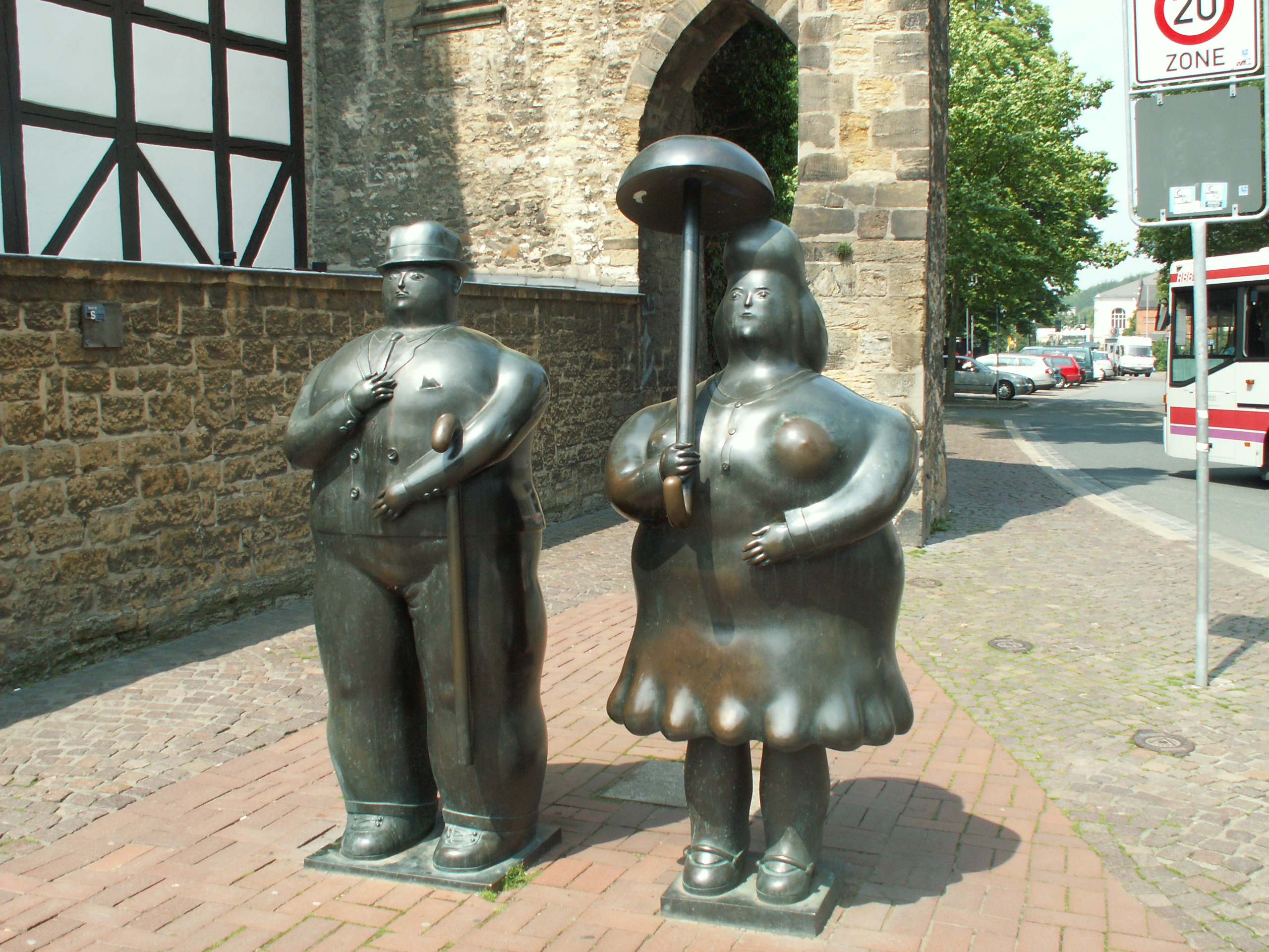 Aufgenommen auf einem Rundgang durch Goslar. Weitere Infos unter Weltkulturerbe-Stadt Goslar.